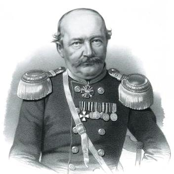 Kniaz' Georgii Rosebovich Dzhandierov, Polkovnik, v chine Podpolkovnika